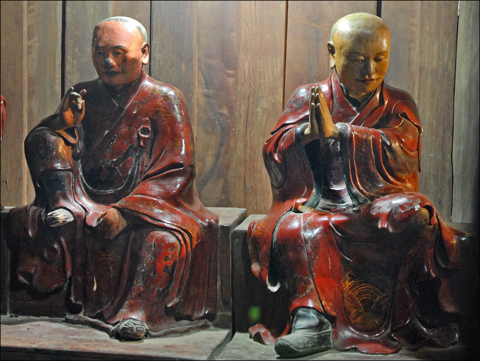 Deux des neuf arhats de droite de la salle du culte. La pagode But Thap (Ninh-Phuc) s'élève dans le village de Dinh To, à 30 Km au sud-est de Hanoi. Elle a été érigée en 1646-1647 par le moine chinois Minh Hanh. Elle compte plusieurs bâtiments dont quatre sont entourés d'un mur d'enceinte. Les bâtiments sont reliés par des galeries.